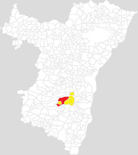 Communauté de communes du Pays de Sainte-Odile